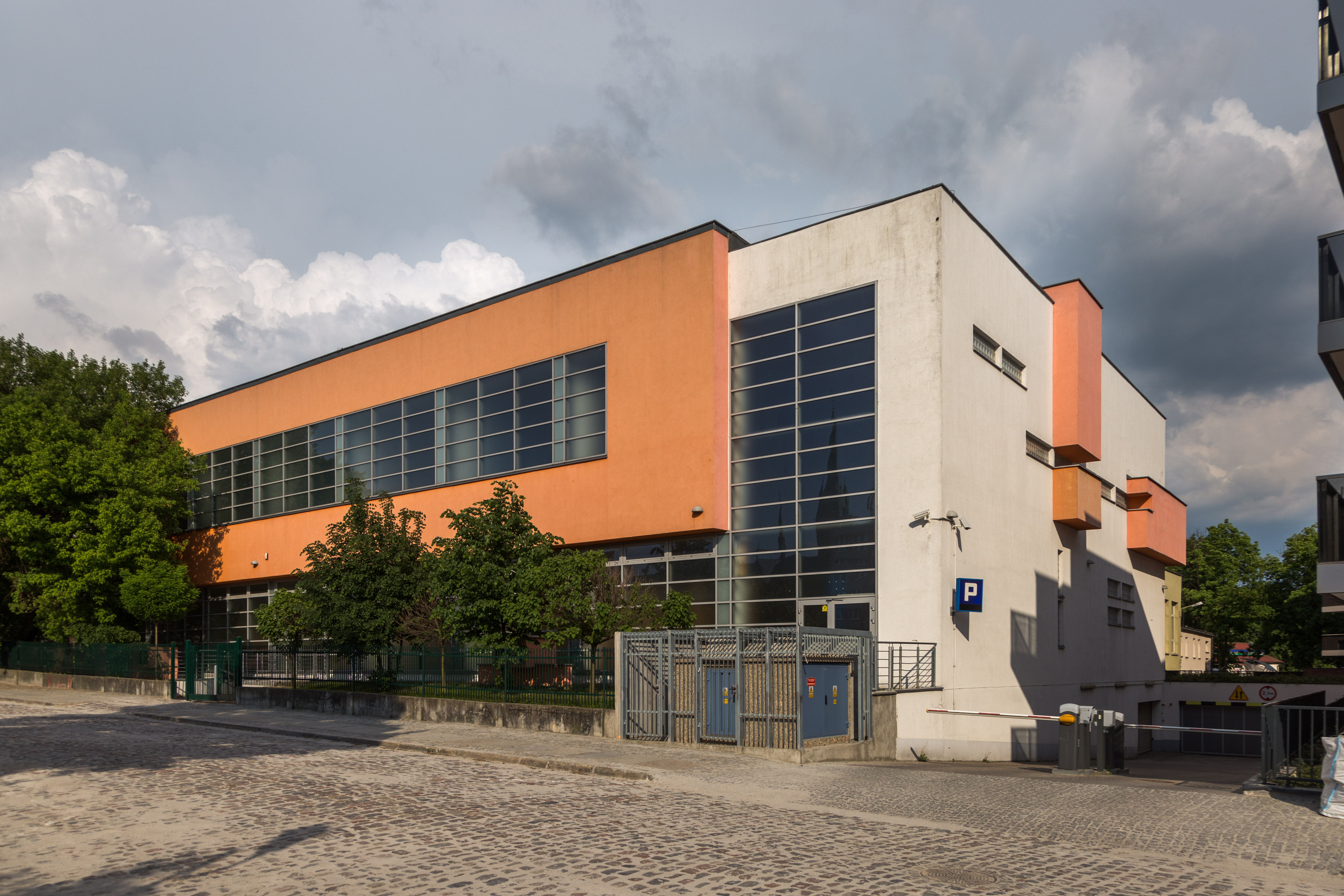 IV Liceum Ogólnokształcące w Toruniu, sala gimnastyczna.